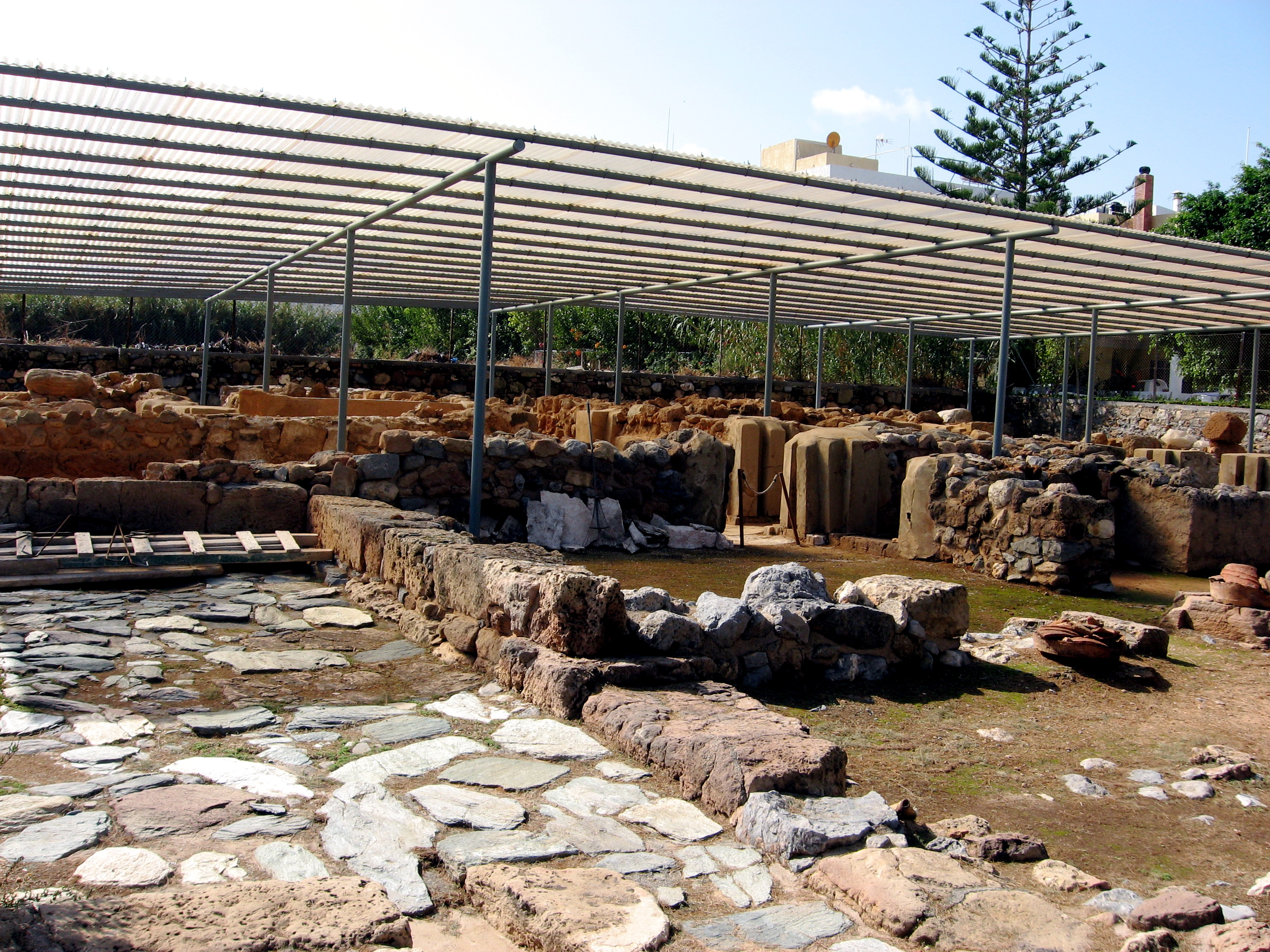 Nerou Khani Minoan Villa